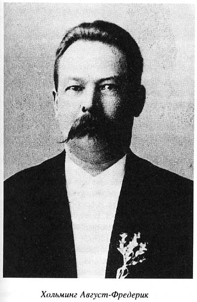 Август-Фредерик Холлминг (1854-1913), финский и российский ювелир